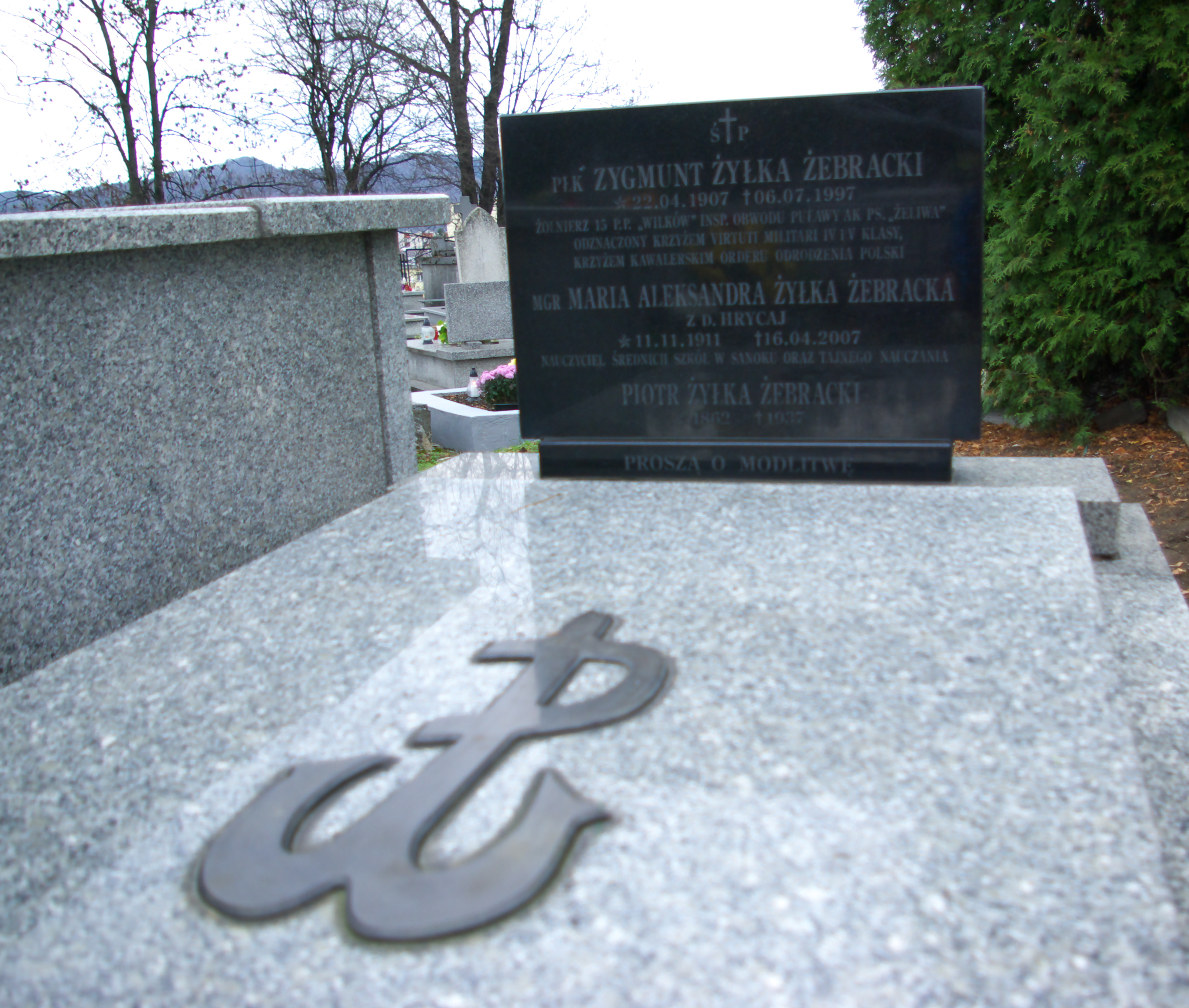 Grobowiec rodziny Żyłka-Żebrackich w części „Matejki Stary” Cmentarza Centralnego w Sanoku